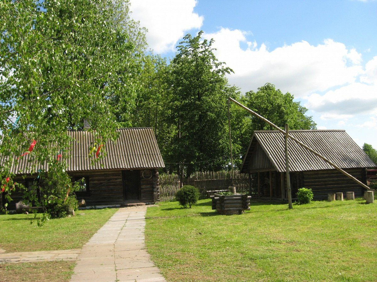 Узда. Музей. Дом рамесніка